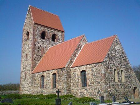 Kirche Polkau, Erxleben (Osterburg)